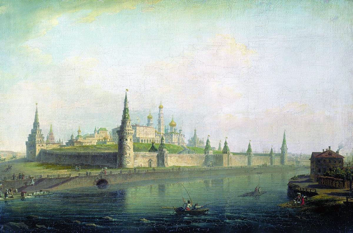 М. Н. Воробьёв. «Вид Московского Кремля (со стороны Каменного моста)». 1819. Холст, масло. 42,6 × 65,5. Государственная Третьяковская галерея, Москва.